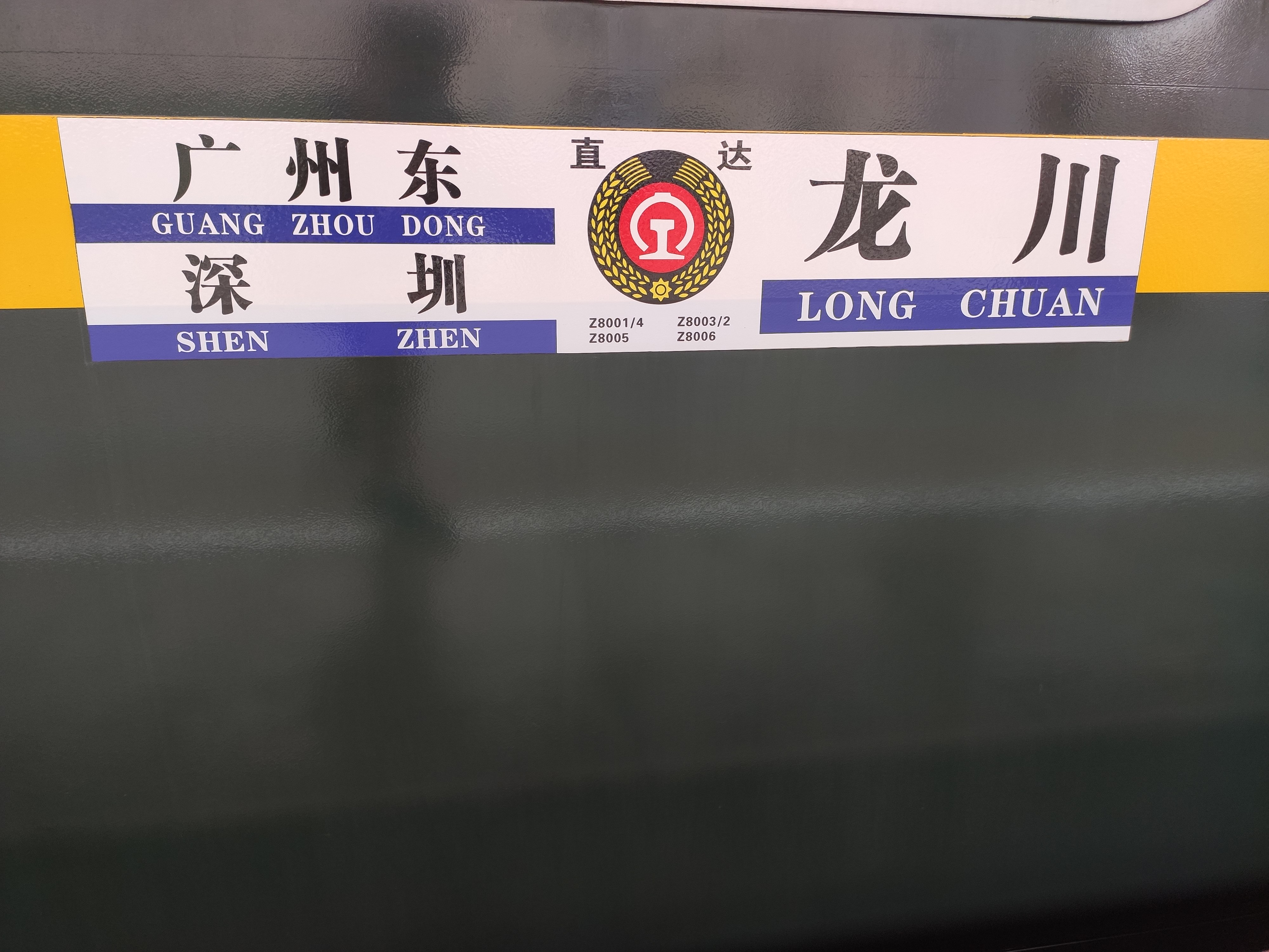 中文（中国大陆）: 广河深城际列车水牌(20200710)